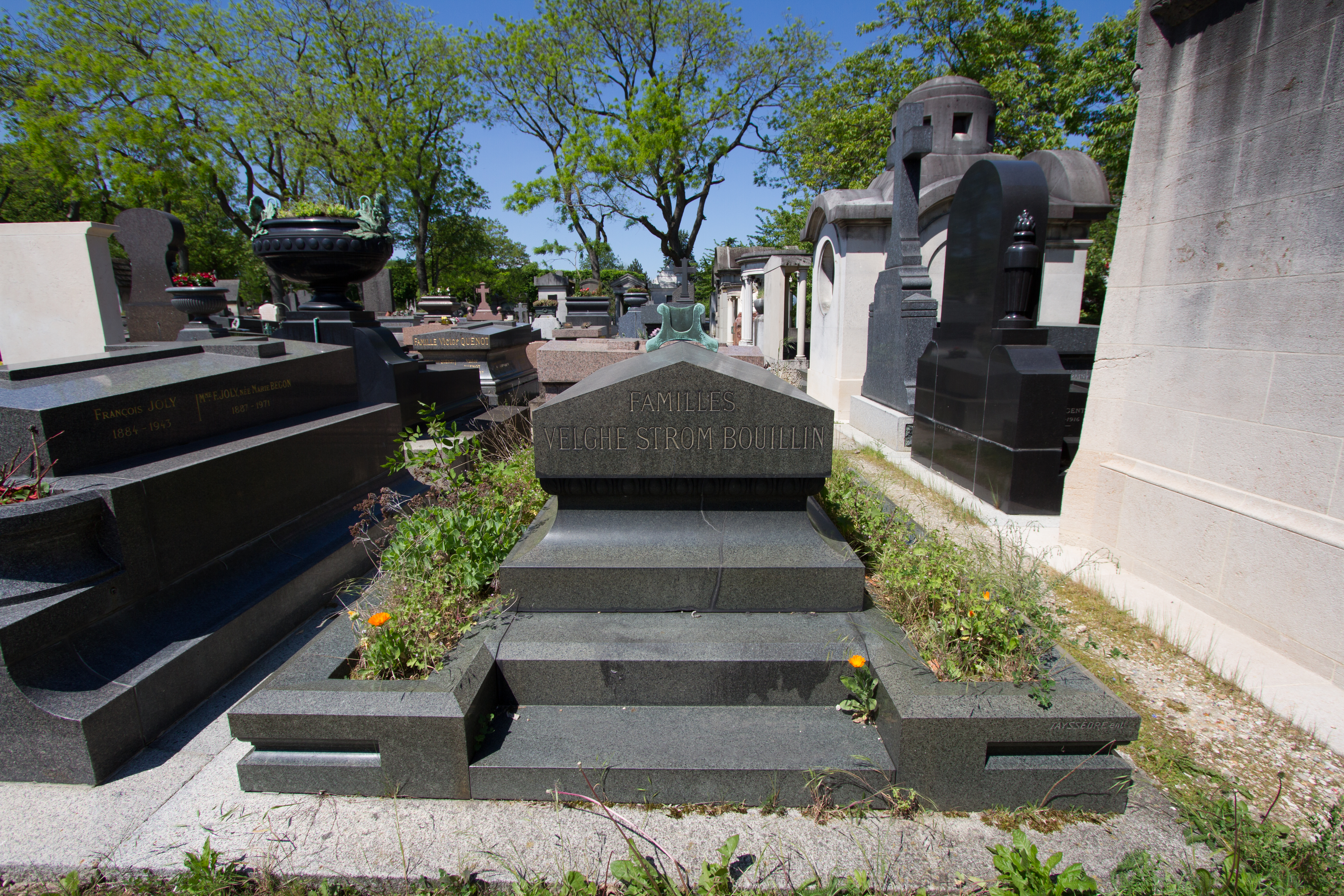 Sépulture d'Alfred Velghe (1870-1904), pilote automobile et oncle de Pierre-Eugène-Alfred Bouillin, dit Pierre Levegh (1905-1955), pilote automobile mort le 11 juin 1955 au Mans au volant de sa Mercedes dans la catastrophe des 24 Heures du Mans qui fait plus de 80 morts dans le public.